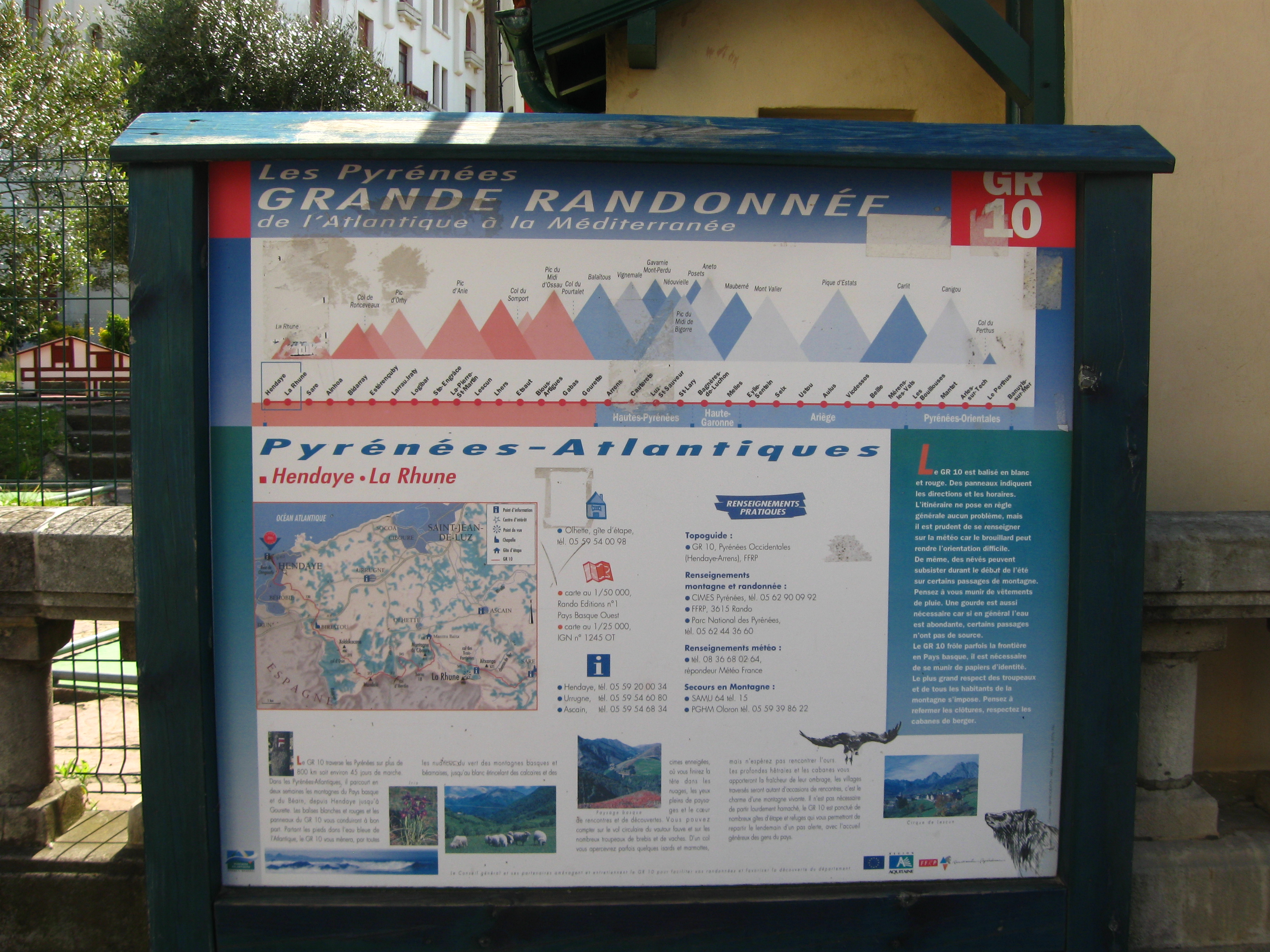 départ du GR10 en face de l'ancien casino à Hendaye.